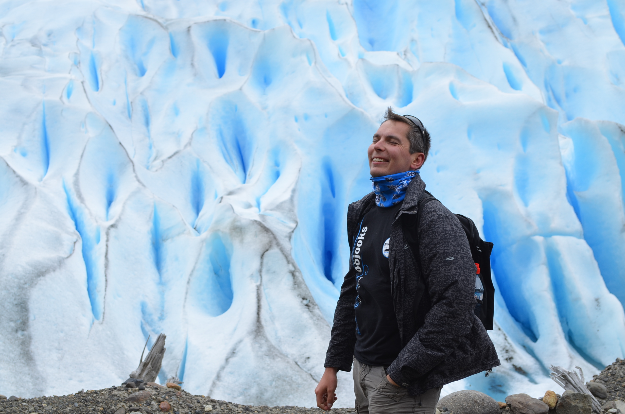 Maailmarändur Marko Torm